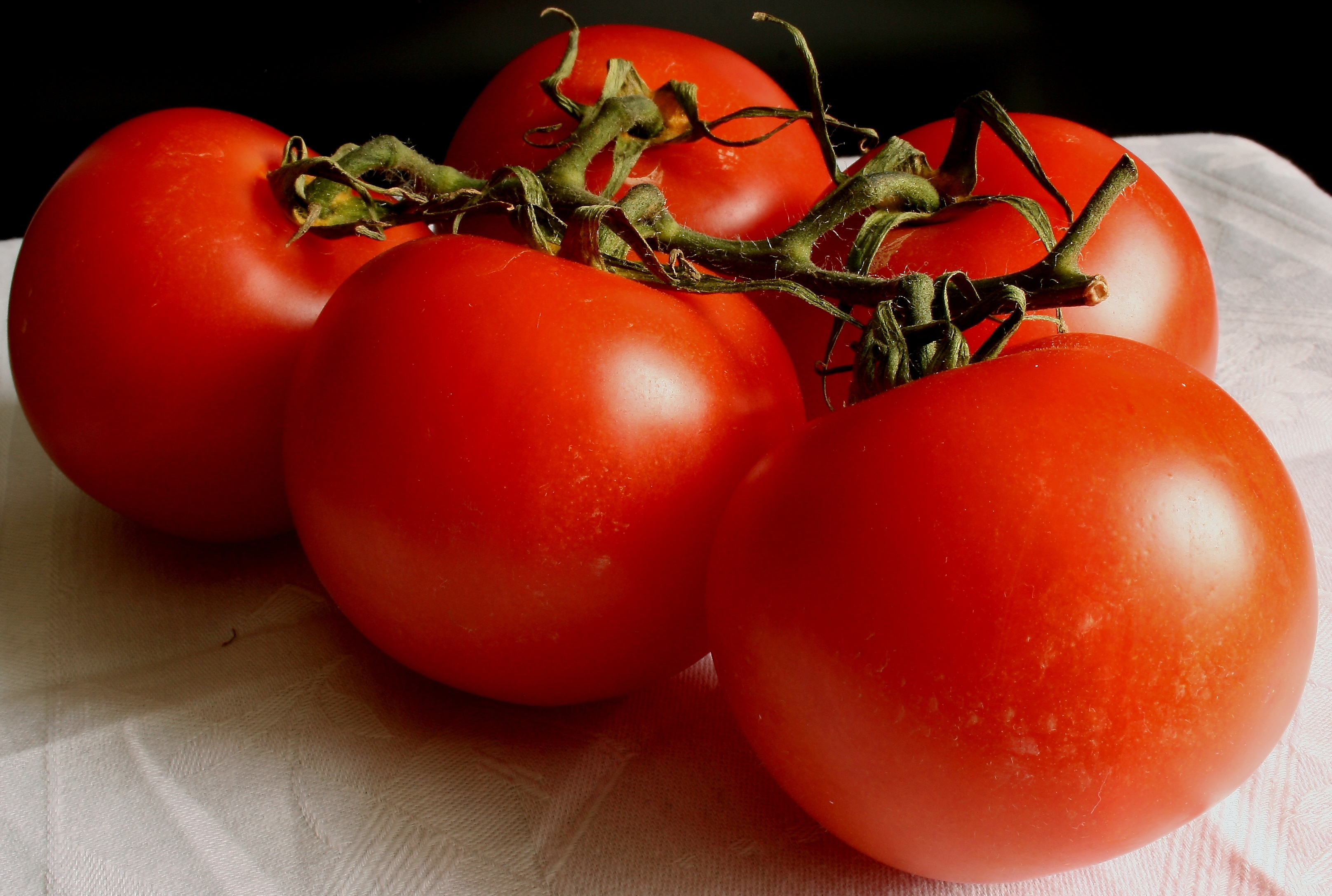 Tomate_2008-2-20